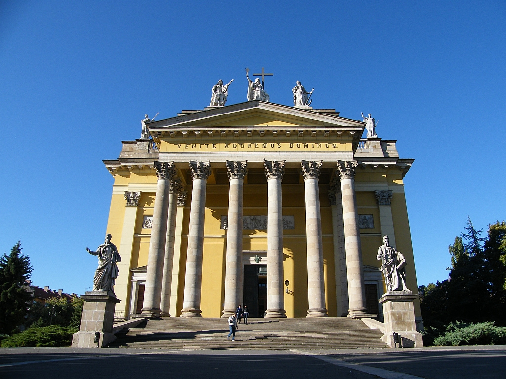 Székesegyház (Szent János apostol és főangyal, Szent Mihály főangyal) (Eger, Eszterházy Károly tér 3.) This is a photo of a monument in Hungary, Identifier: 5554